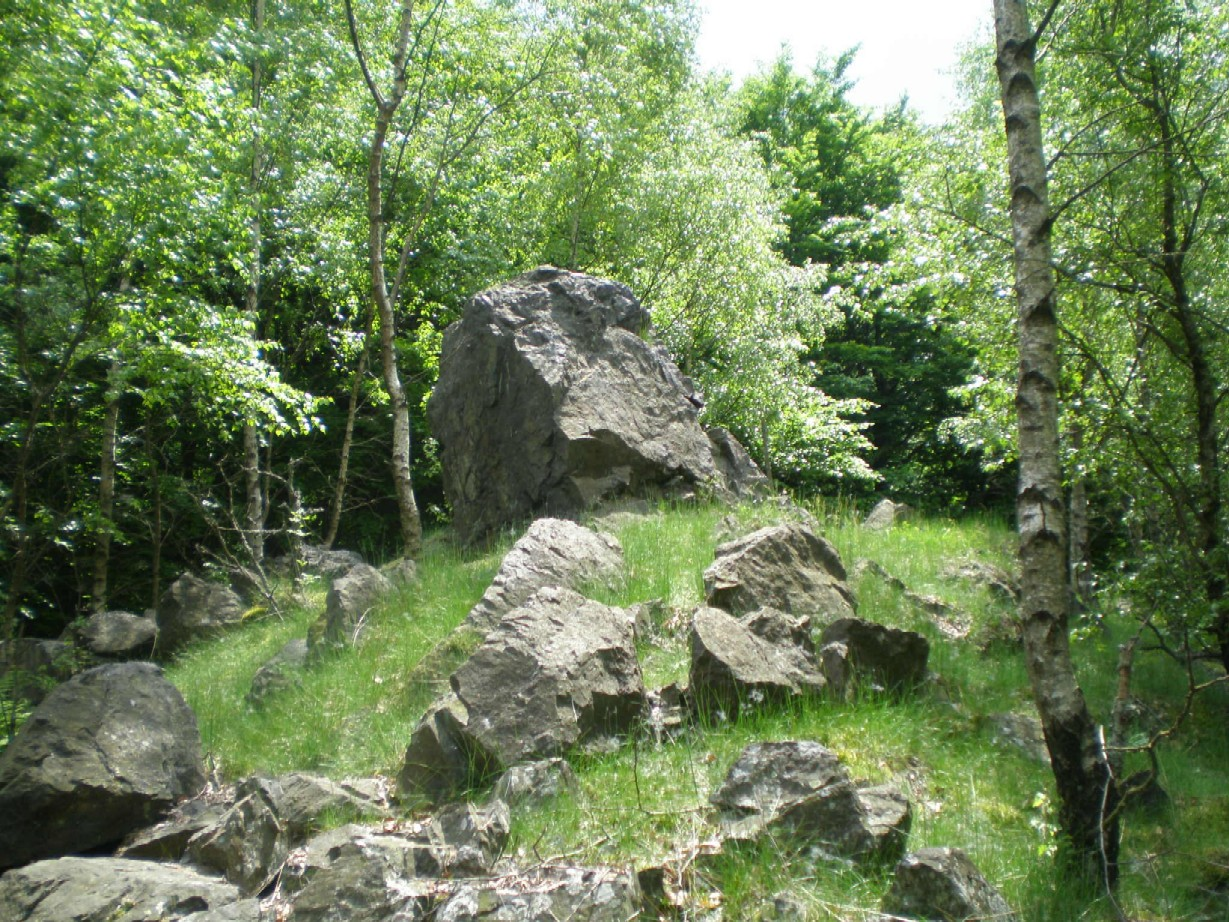 Vrchol kopce Palcíř (725 m) v Brdech.